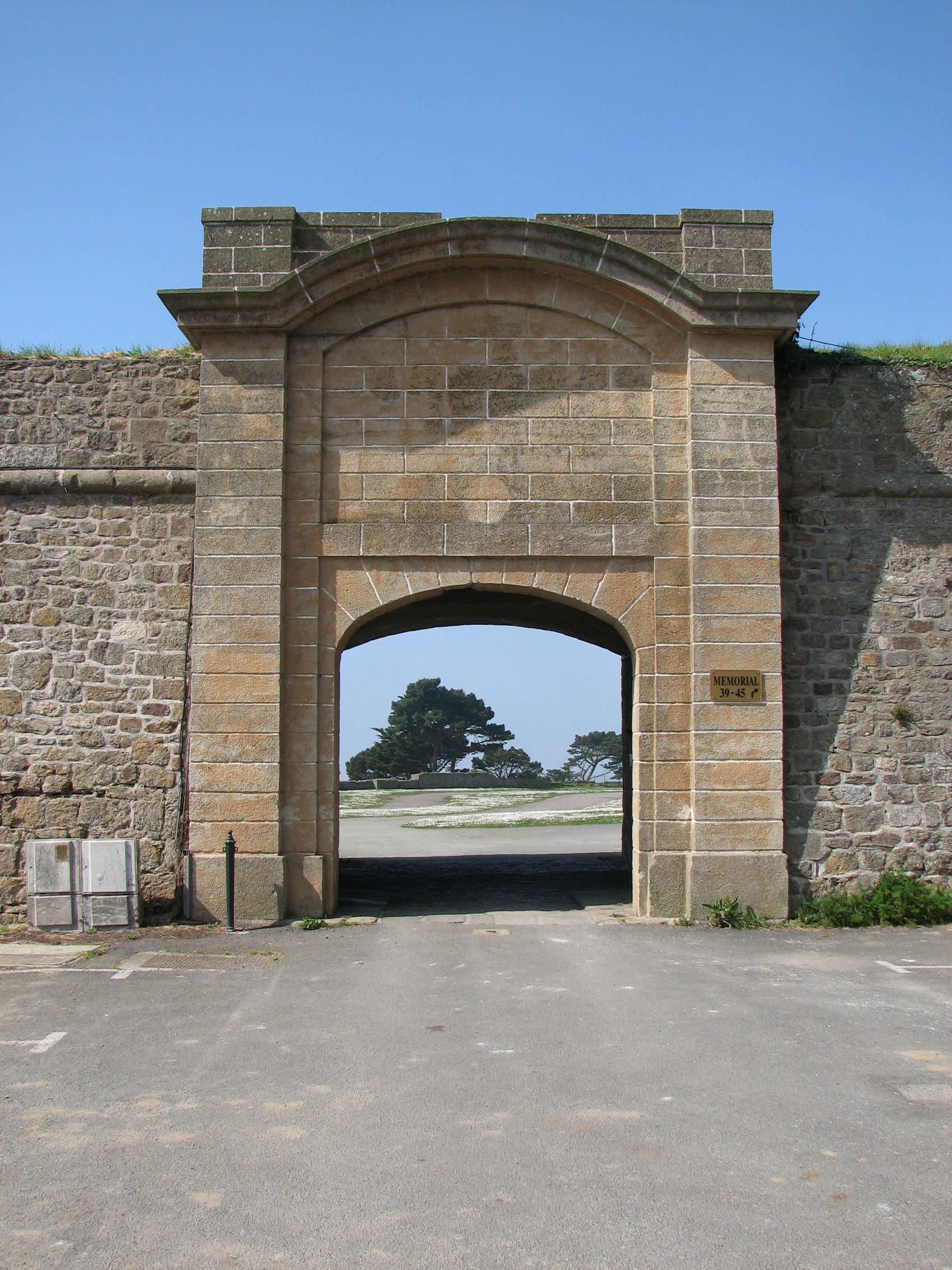 Entrée du fort de la cité d'Aleth, Saint-MaloCité d'Aleth gate, Saint-Malo